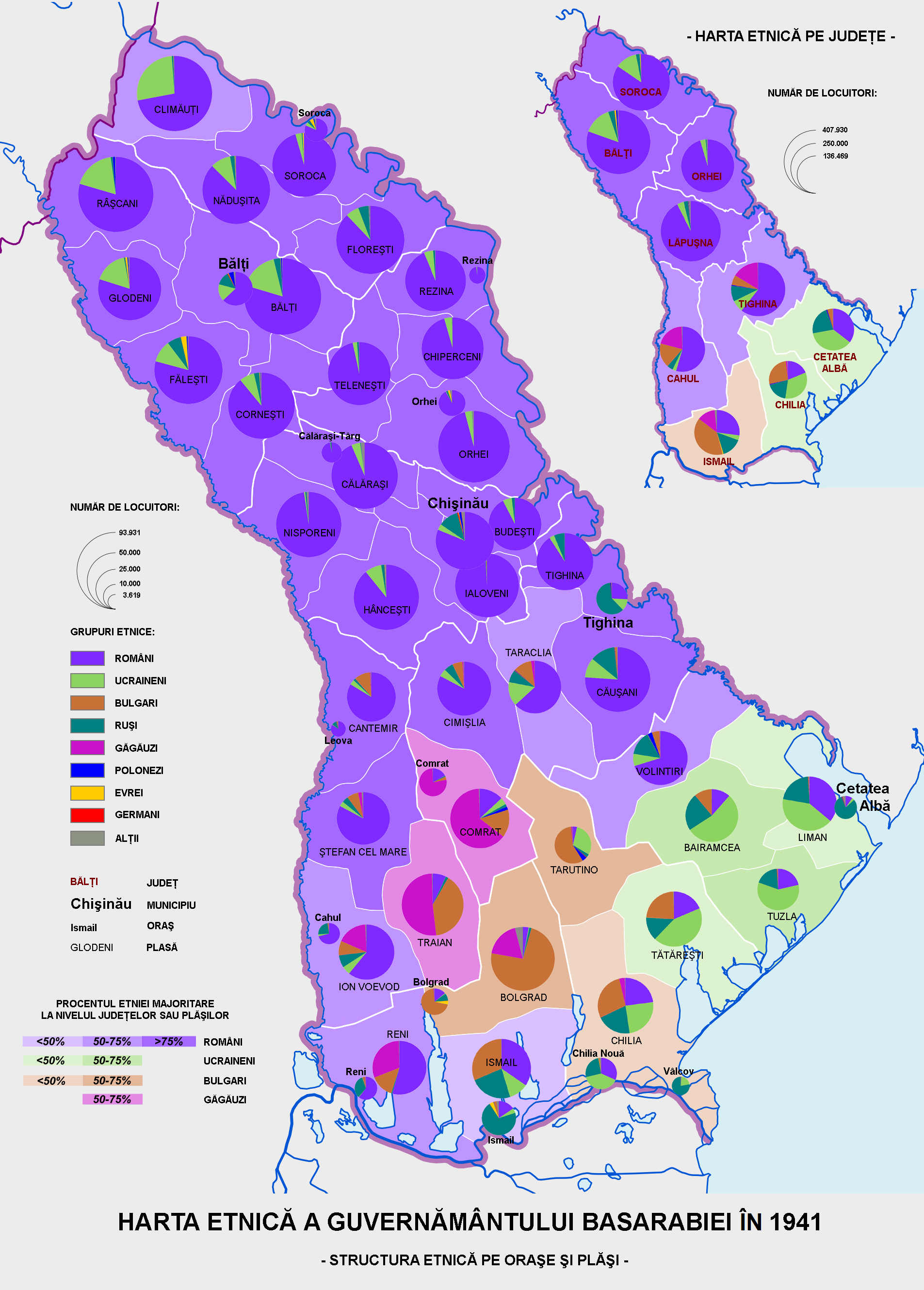 Harta etnica a Guvernamantului Basarabiei in 1941.